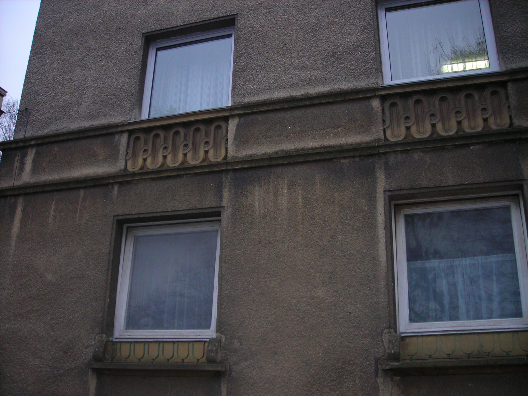 detail fasady